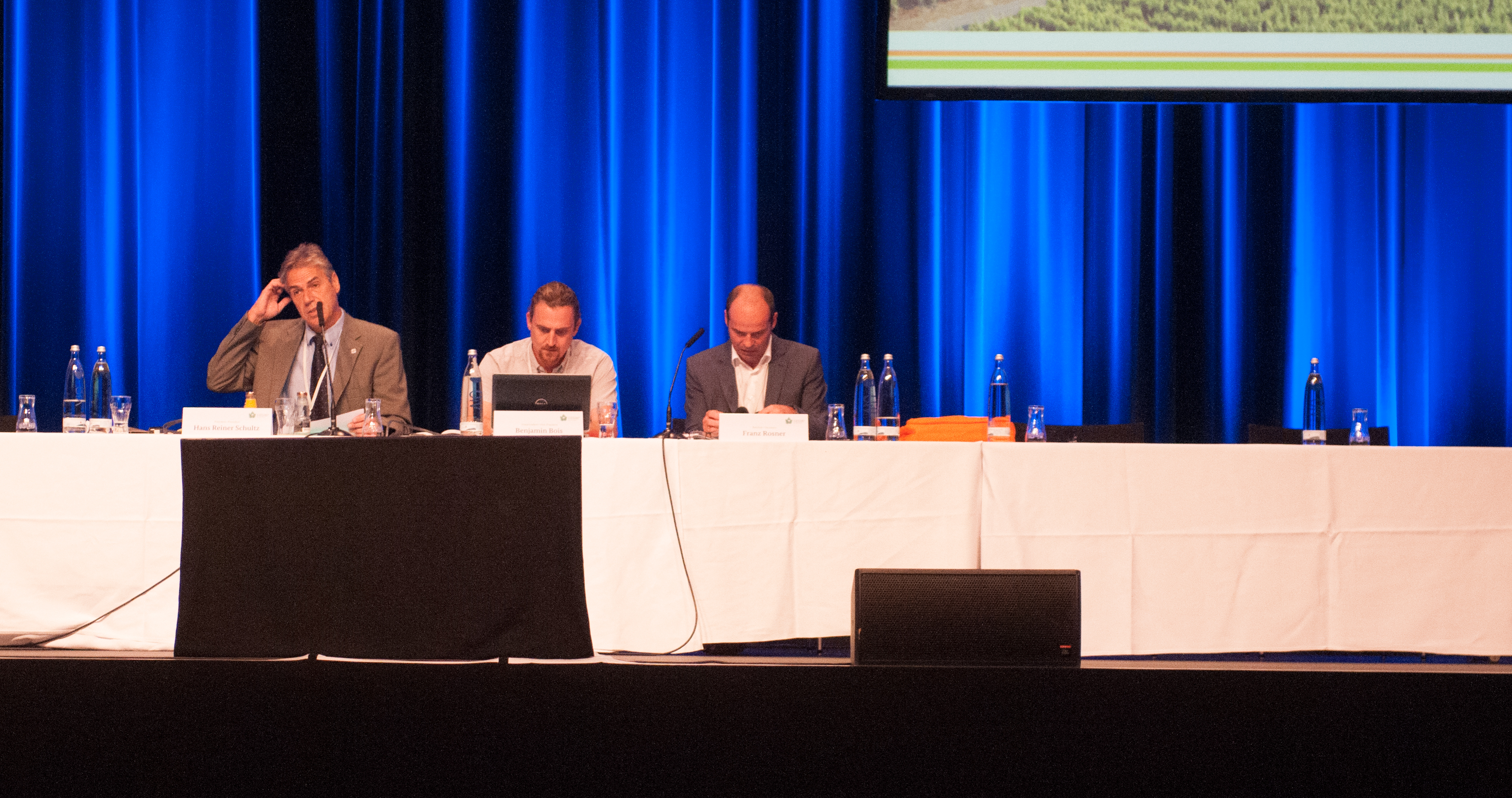 38th World Congress of Vine and Wine in Mainz - 38. Weltkongress für Rebe und Wein. Von links nach rechts: Hans Reiner Schultz, Gründungspräsident der Hochschule Geisenheim; Benjamin Bois, Dozent an der Université de Bourgogne-Franche-Comté, Institut Universitaire de la Vigne et du Vin "Jules Guyot"; Franz G. Rosner, Research Manager des österreichischen Lehr- und Forschungszentrums für Wein- und Obstbau in Klosterneuburg. 5.-10. Juli 2015 in Mainz, Rheingoldhalle